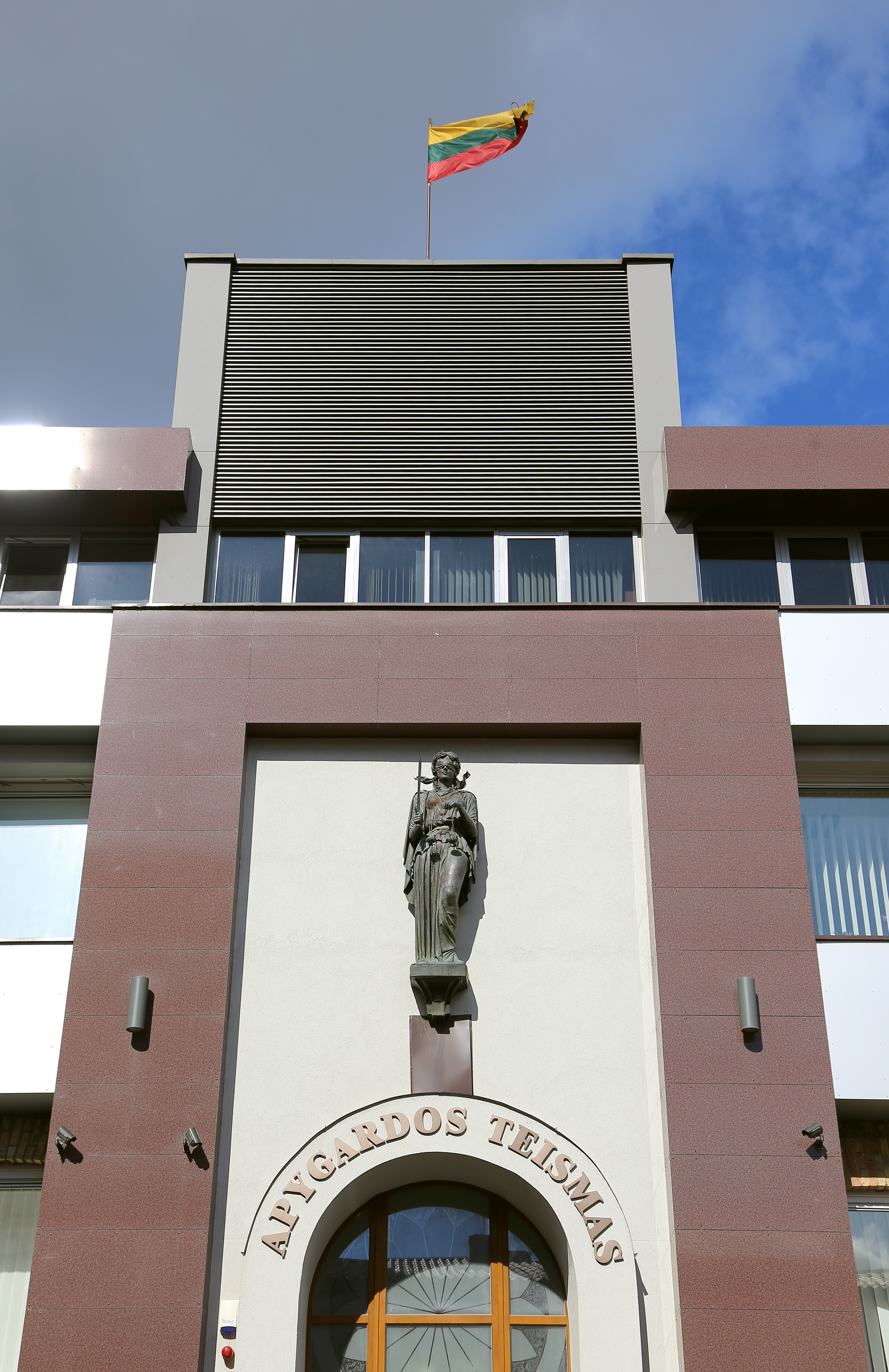 Šiaulių apygardos teismo įėjimas.